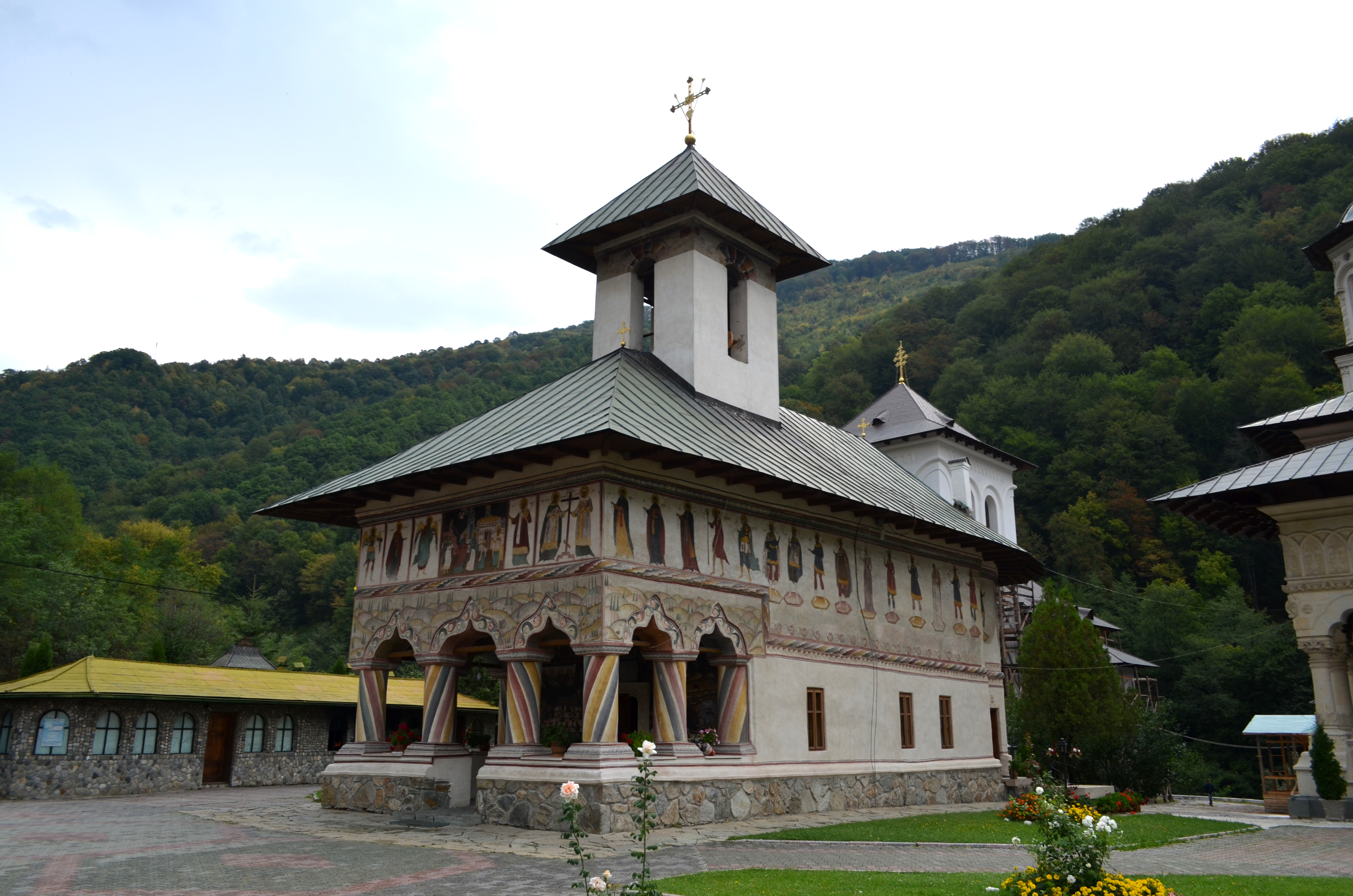 Mănăstirea Lainici - Biserica veche